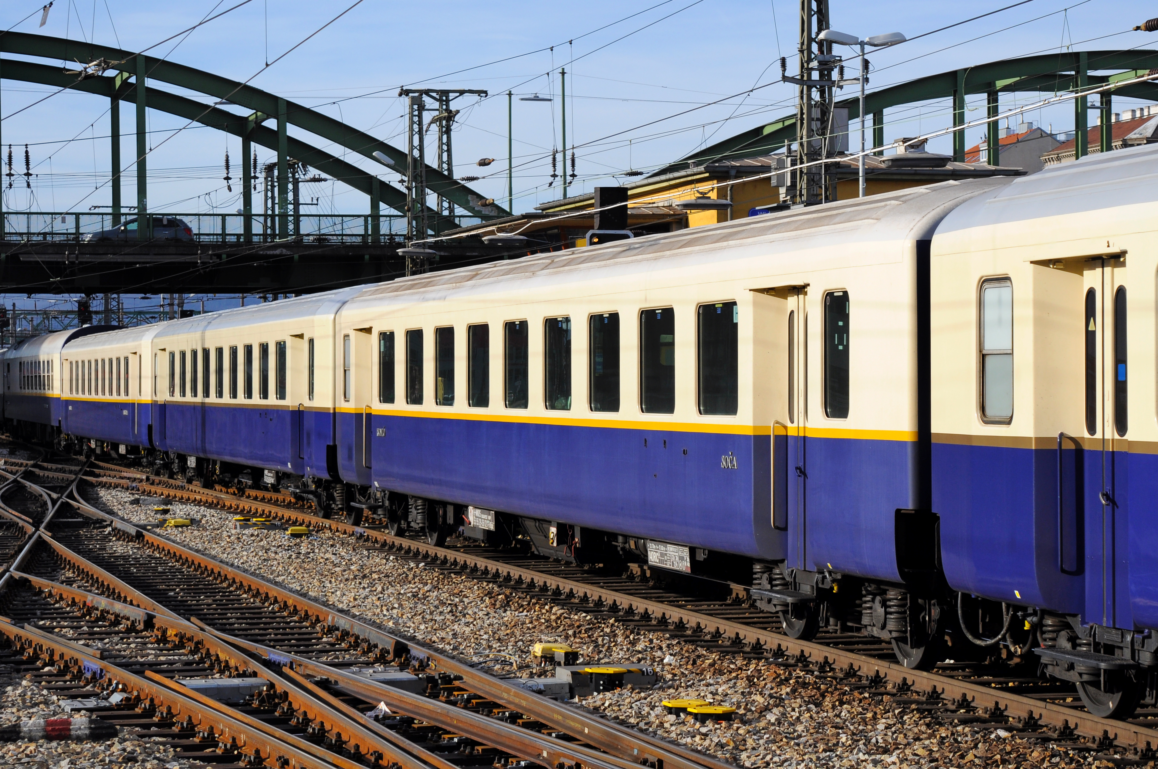 Schlierenwagen 55 55 29-36 021-9 (ex ÖBB 29-35 624) der MÁV-Nosztalgia am Wiener Westbahnhof.